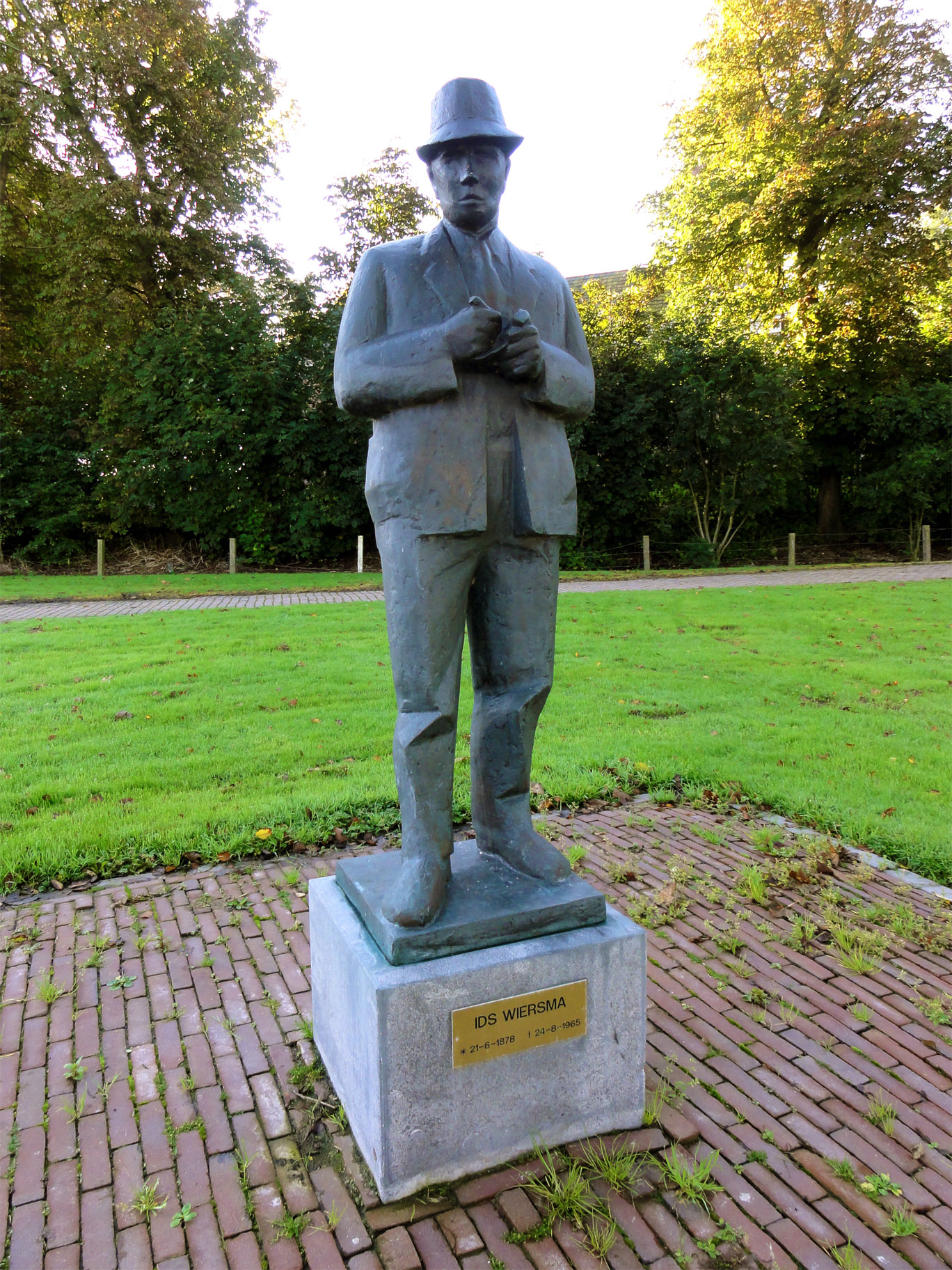 Ids Wiersma (1878-1965) in Brantgum door Gosse Dam (1950)